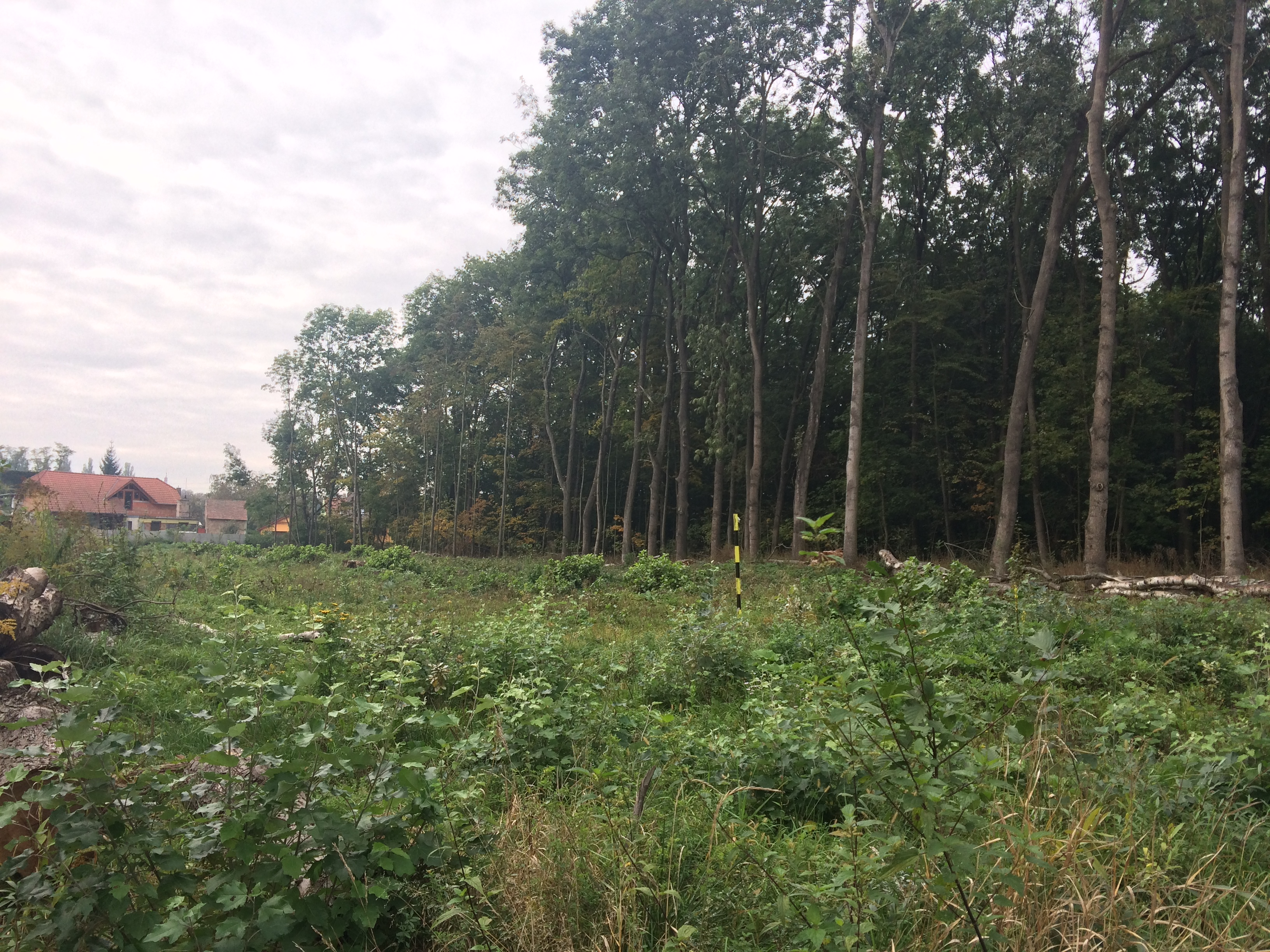 Holoseč z roku 2015 Hluchov